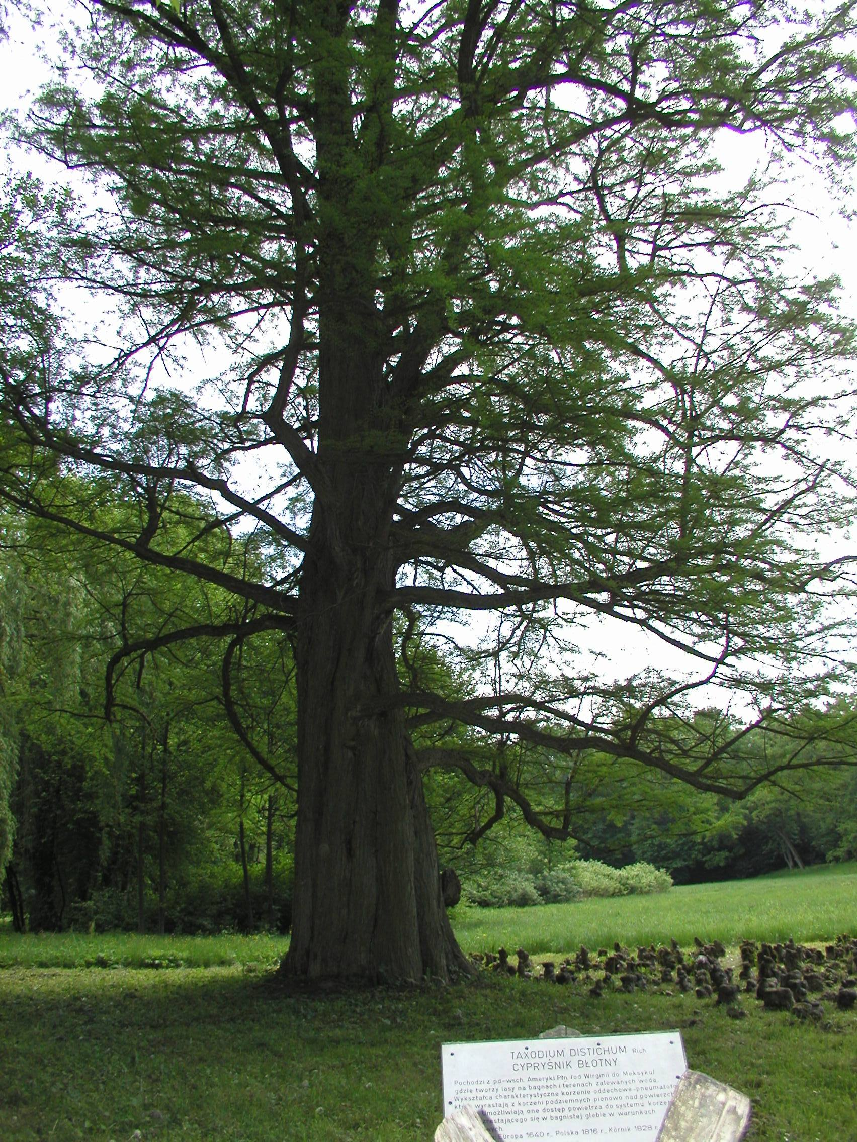 Cypryśnik Błotny w arboretum w Kórniku 24 maja 2003 r. Autor: Barbara Wrzesińska